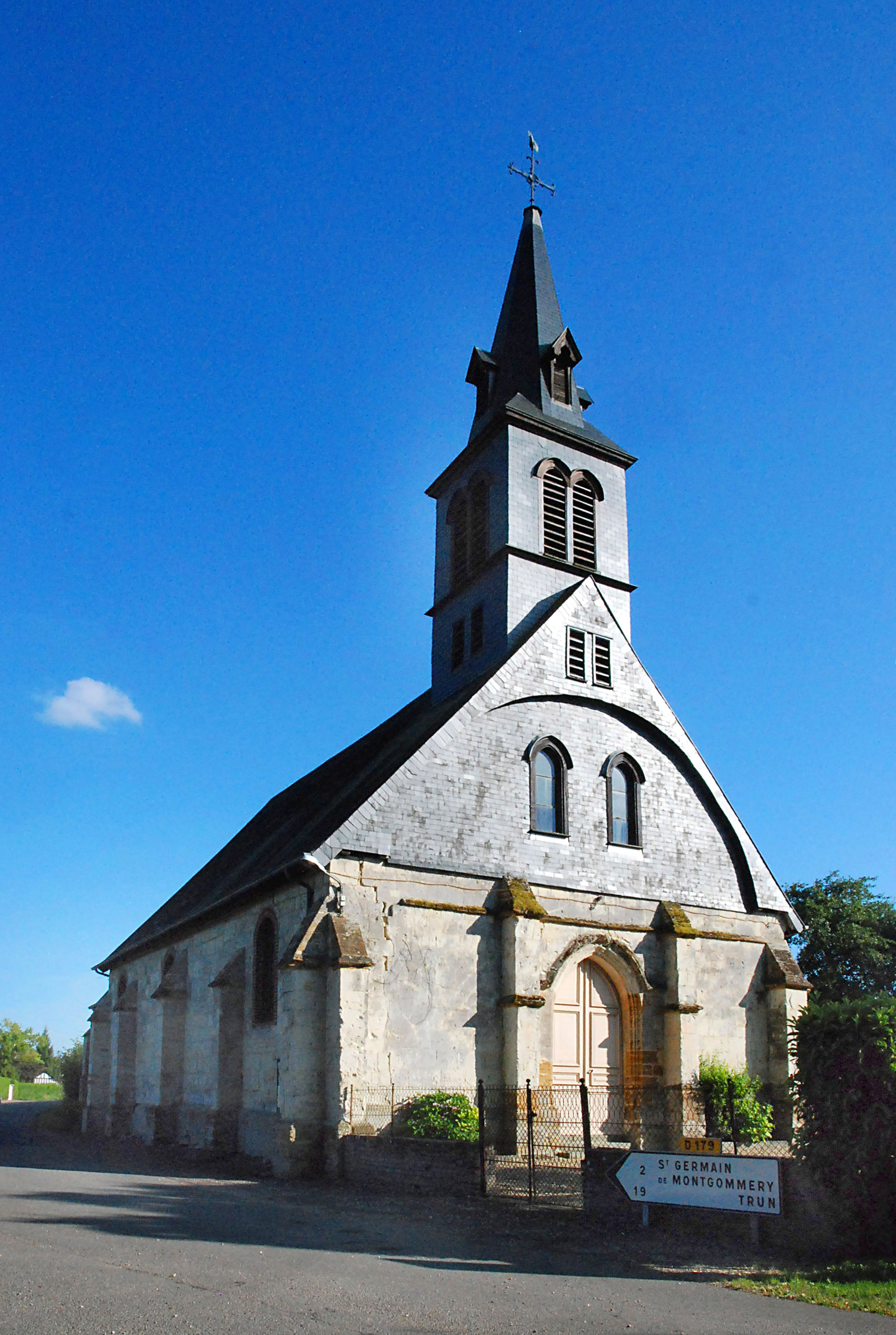 Sainte-Foy-de-Montgommery (Calvados)